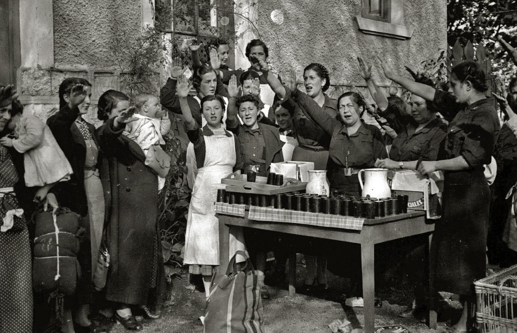 Título original: Reparto de comida por mujeres de la Sección Femenina (2/14) Localización: Guipúzcoa